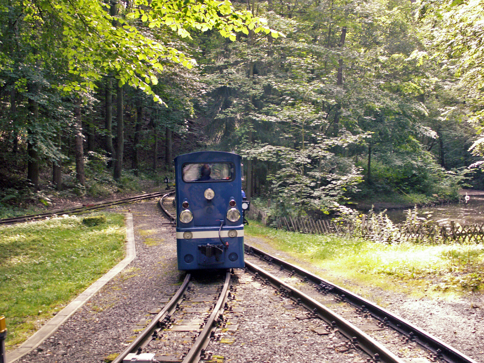 Parkbahn Gera